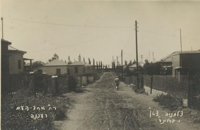 רחוב אחד העם הוא אחד מששת הרחובות הראשונים שנסללו במושבה הצעירה לאחר סלילת ברחוב בראשי- רחוב אחוזה